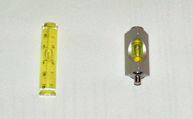 Zwei Messlibellen